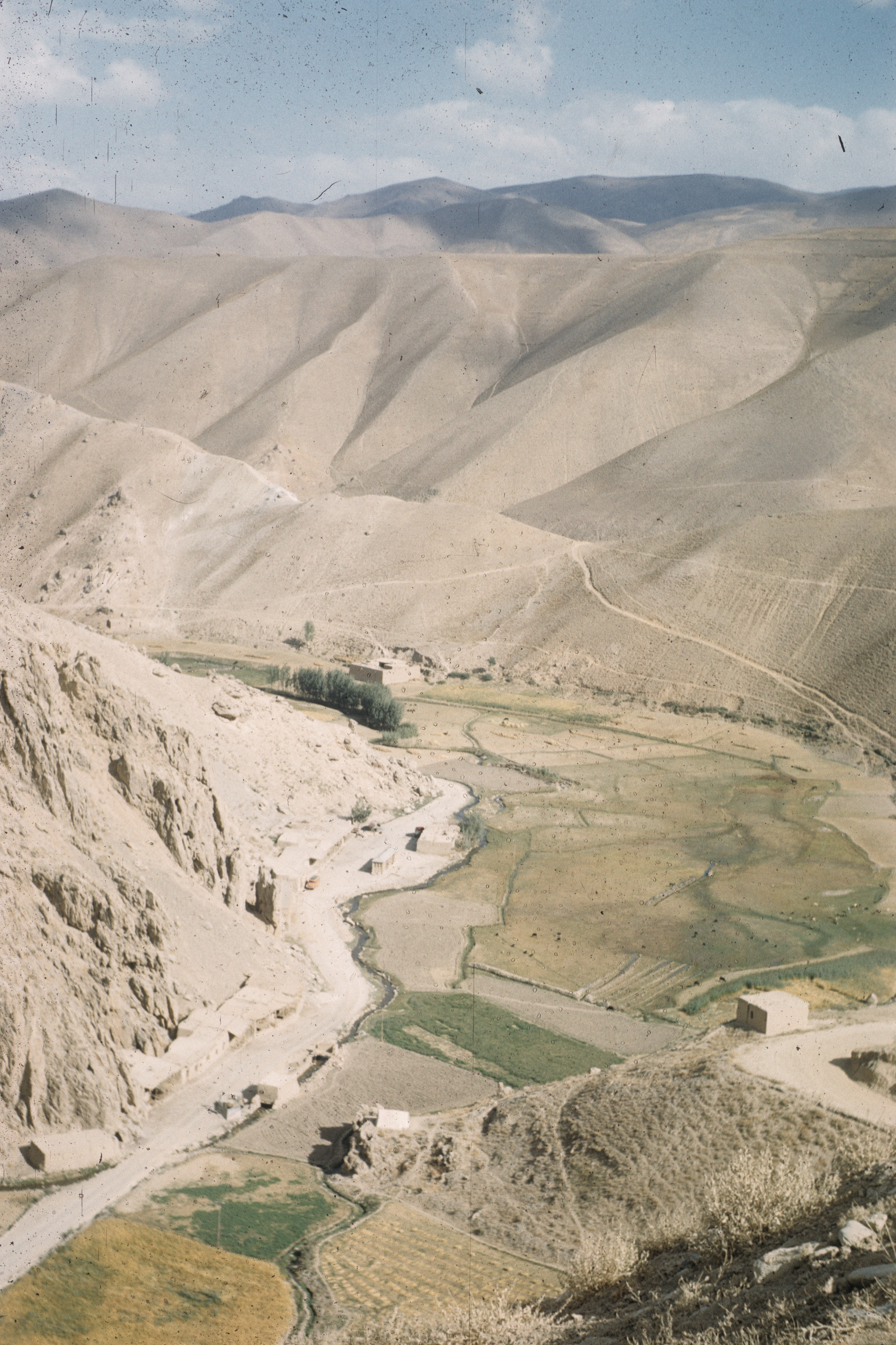 Shibar pass.